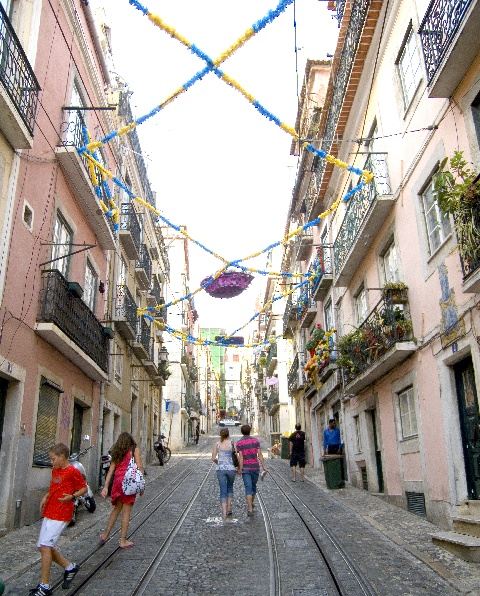 Wikipedia: Lisbona